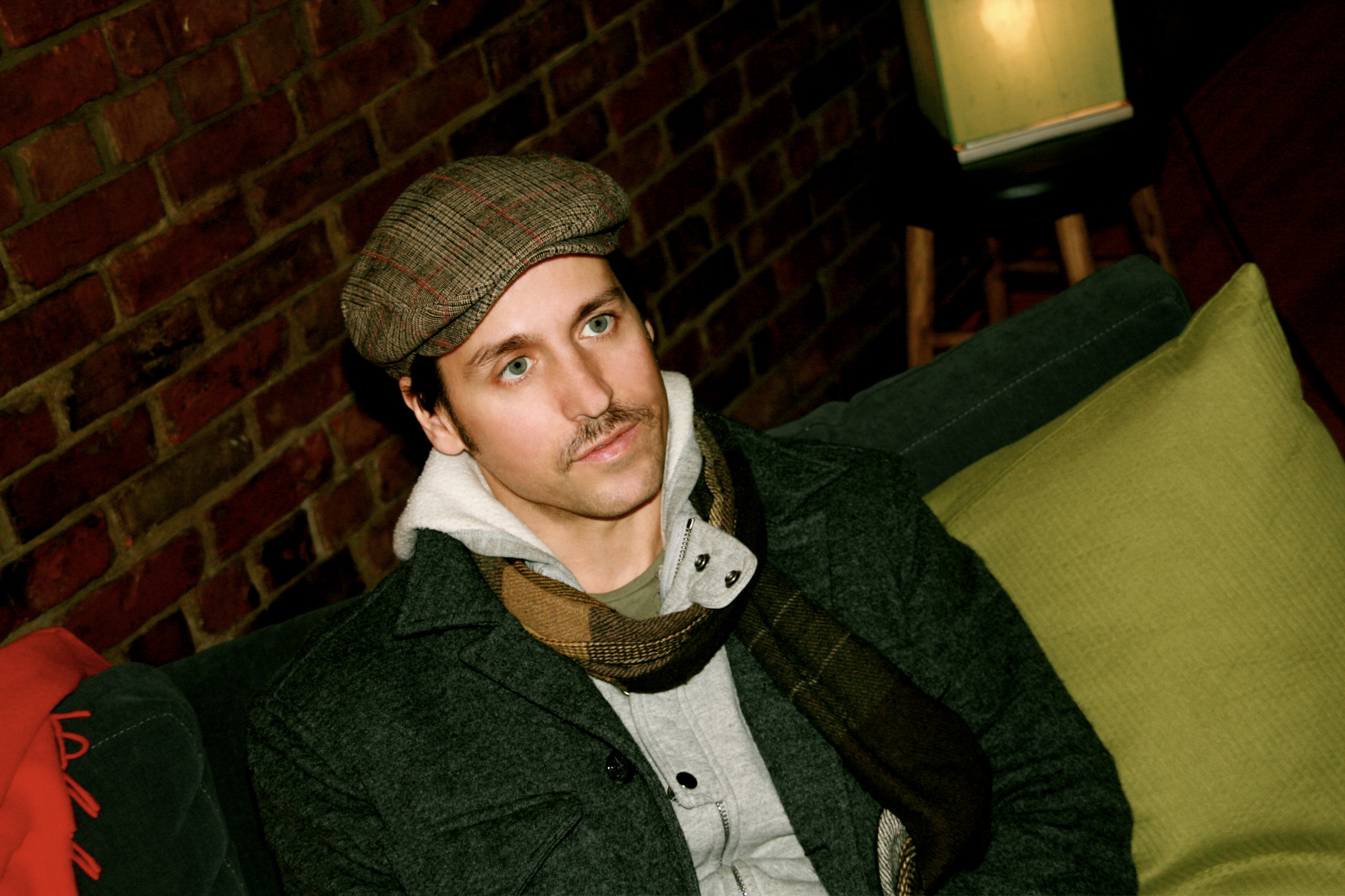 Raine Maida being interviewed